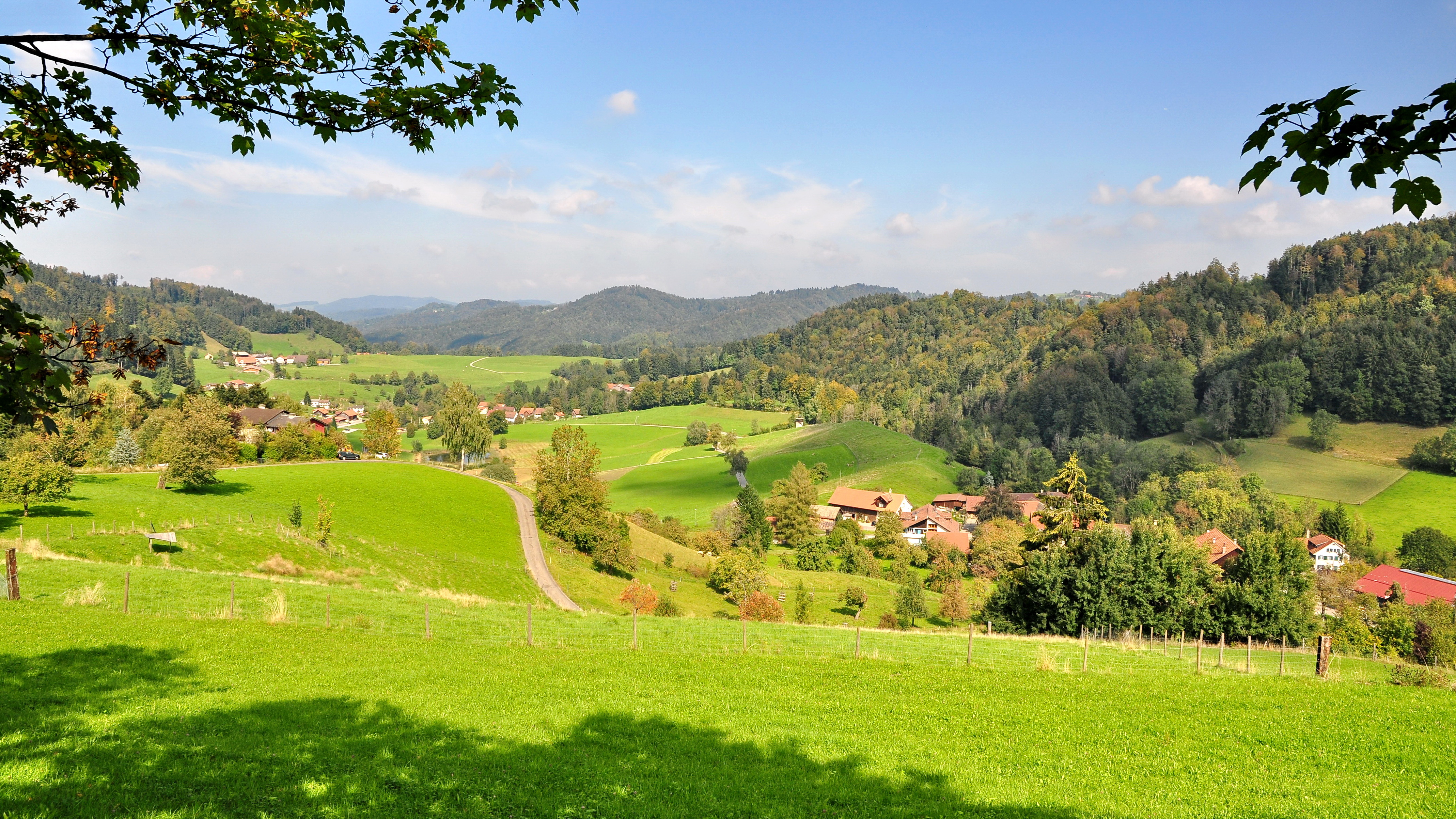 Tösstal : Neuthal in Bäretswil (Switzerland)